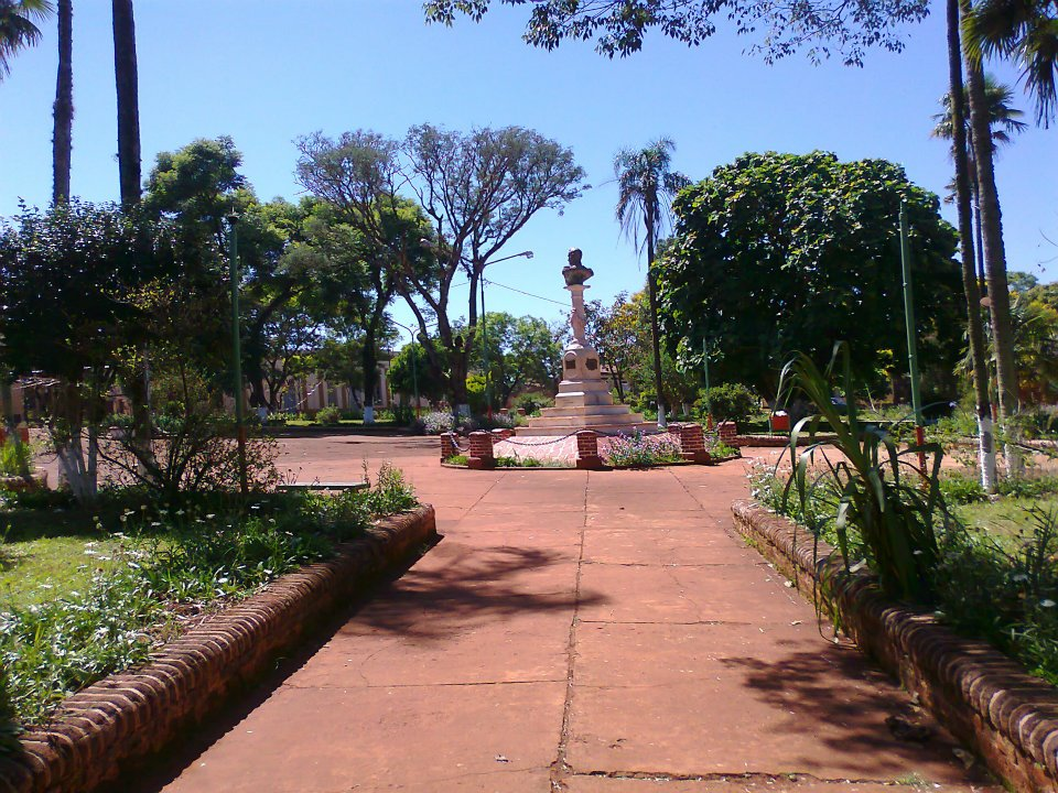 Plaza Central del Pueblo, antes de su remodelación en 2015